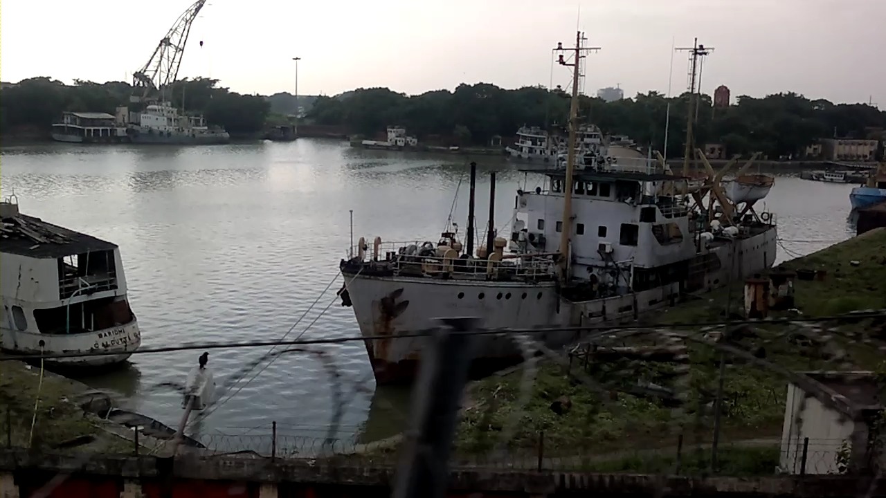 Khidirpore dock